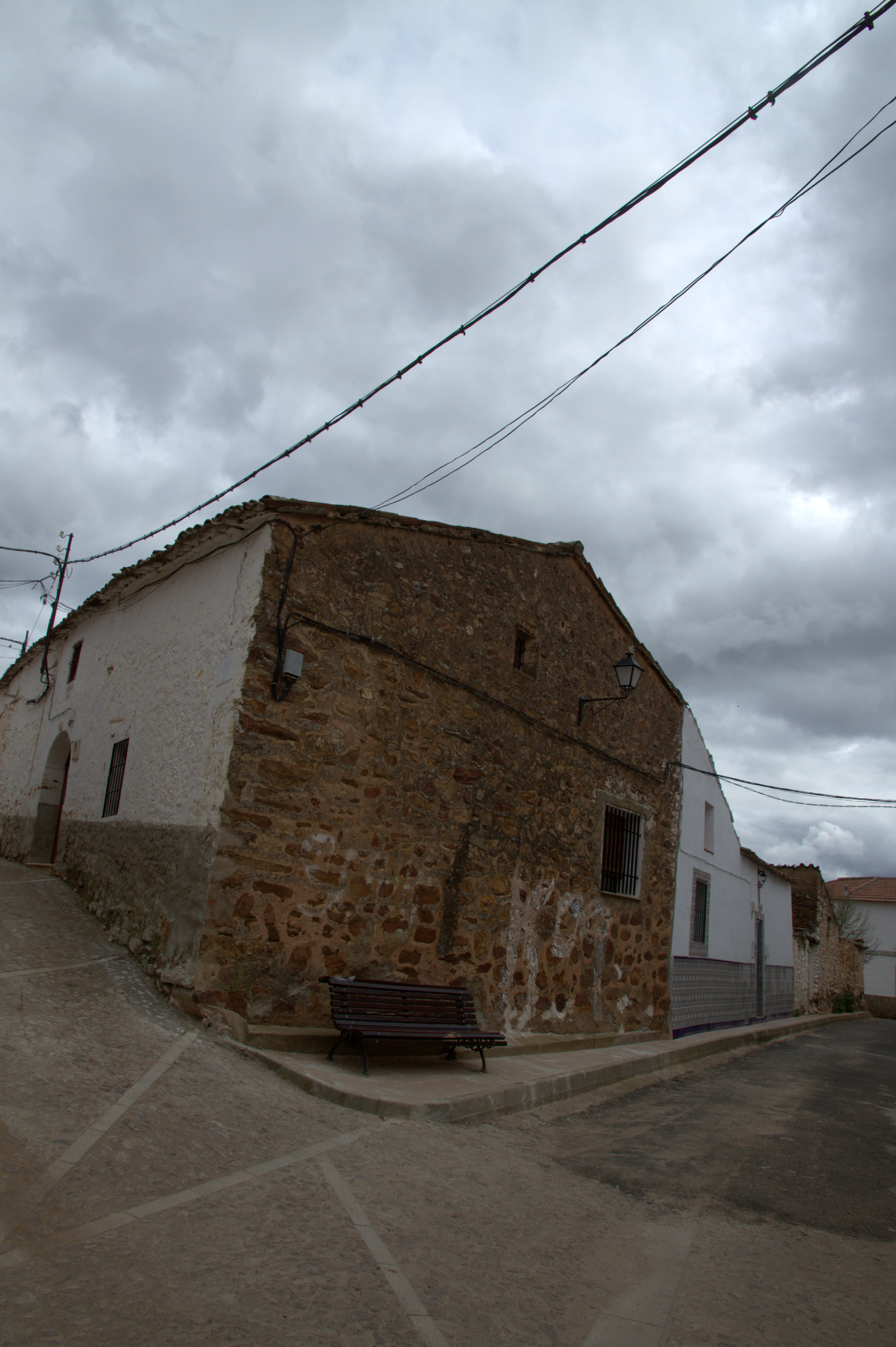 Vista de la calle Fuente, a la altura del número 11, en Fontanarejo, Ciudad Real, España.